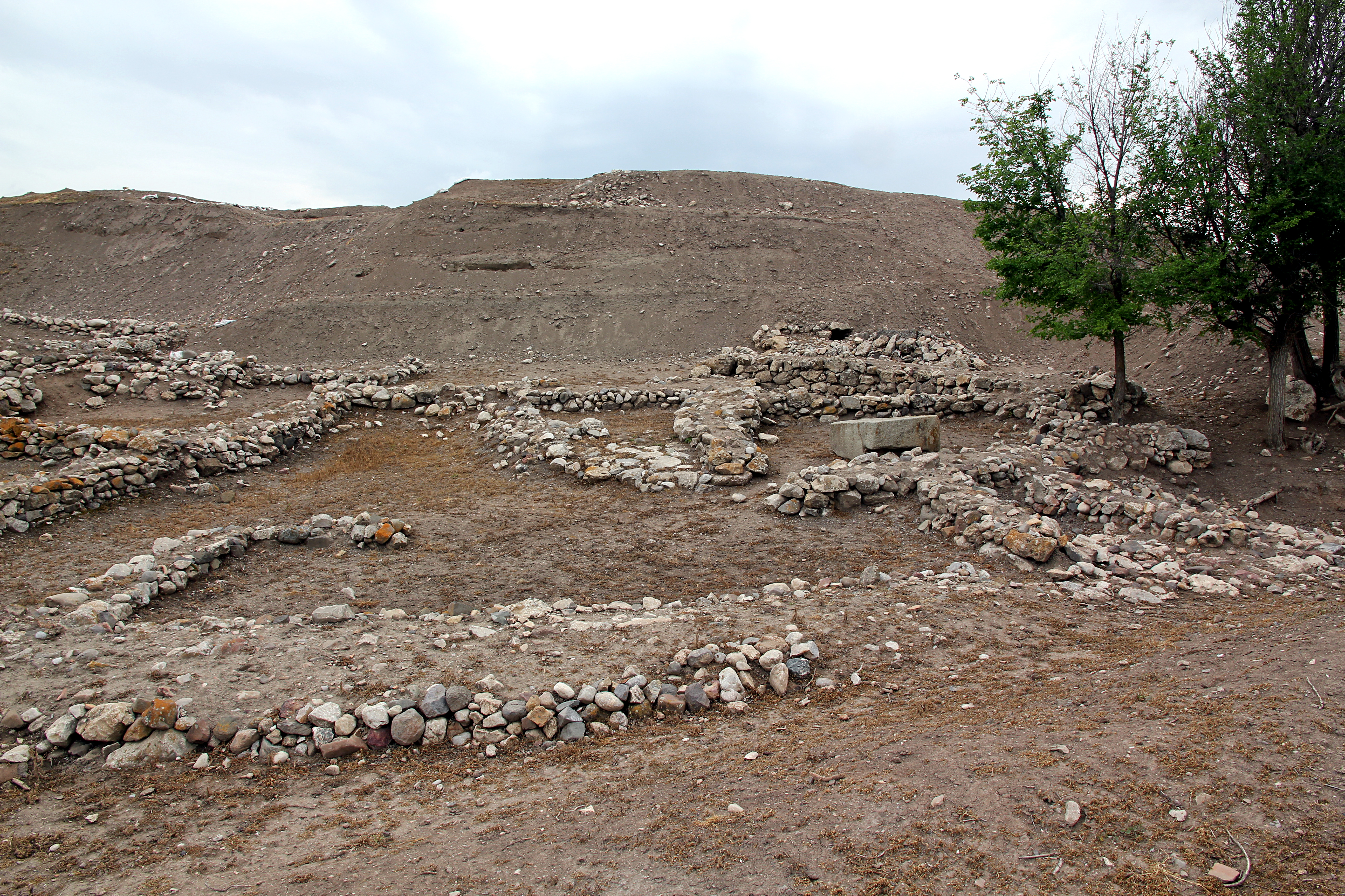 Eskiyapar, antiker Siedlungshügel in der nordtürkischen Provinz Çorum